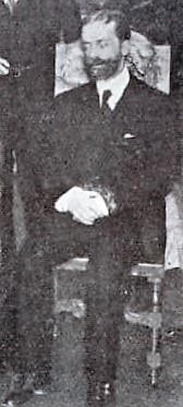 Antonio Huneeus Gana como ministro de eelaciones exteriores, culto y colonización del Presidente de la República Don Ramón Barros Luco en el año de 1912.